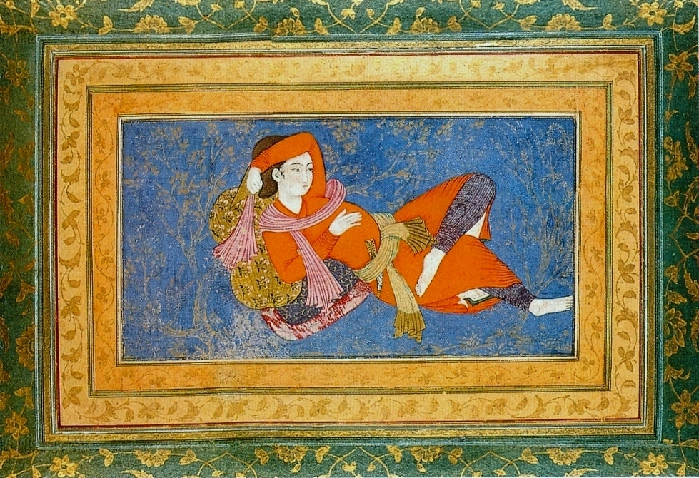 Reclining_Youth.__1600-1630